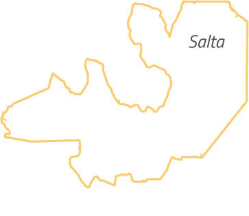 EDESA asumió la concesión del servicio de distribución y comercialización de energía eléctrica con exclusividad zonal en el territorio de la provincia de Salta.